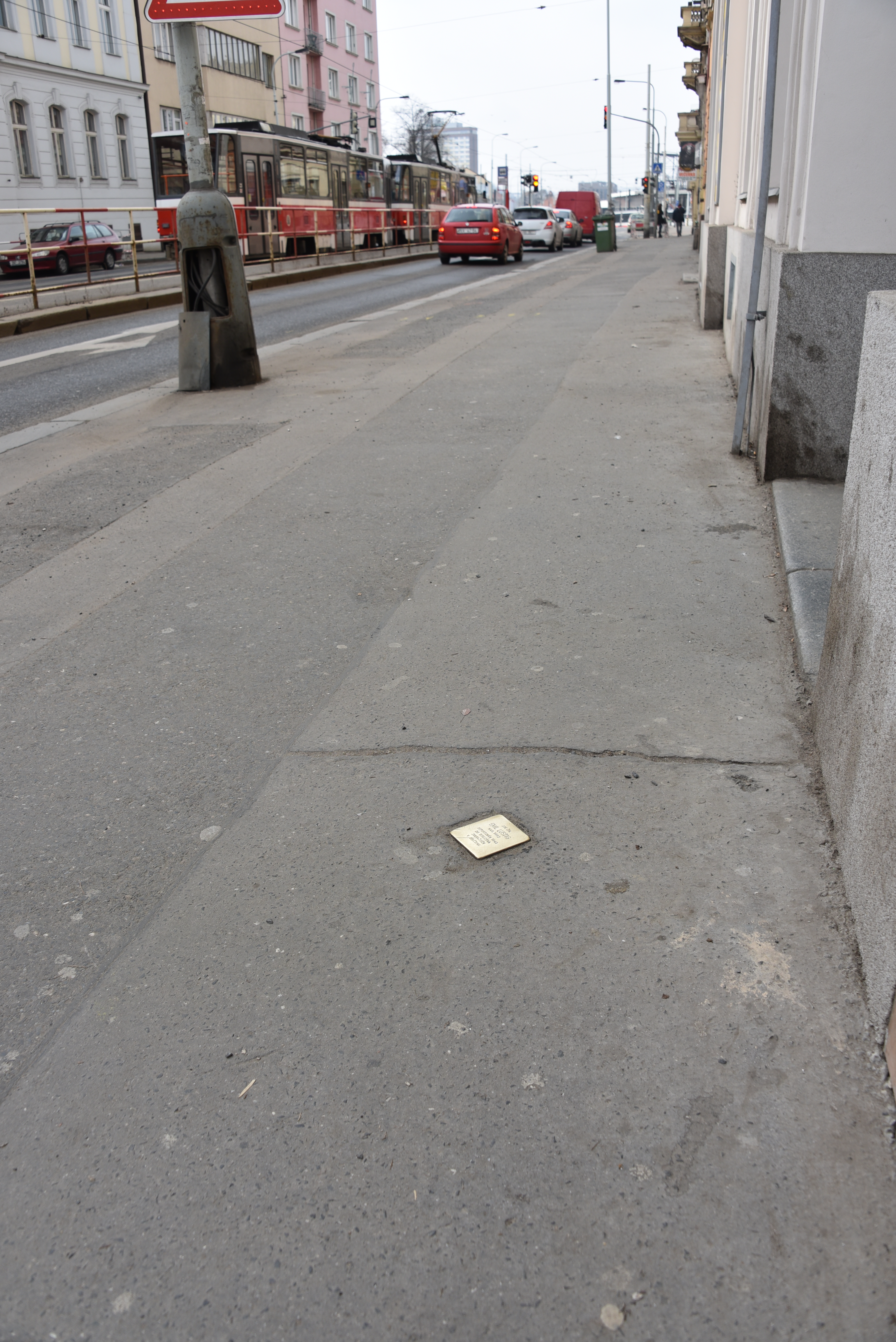 Stolperstein für Emil Lustig in Prague-Libeň, Sokolovská 428/137.